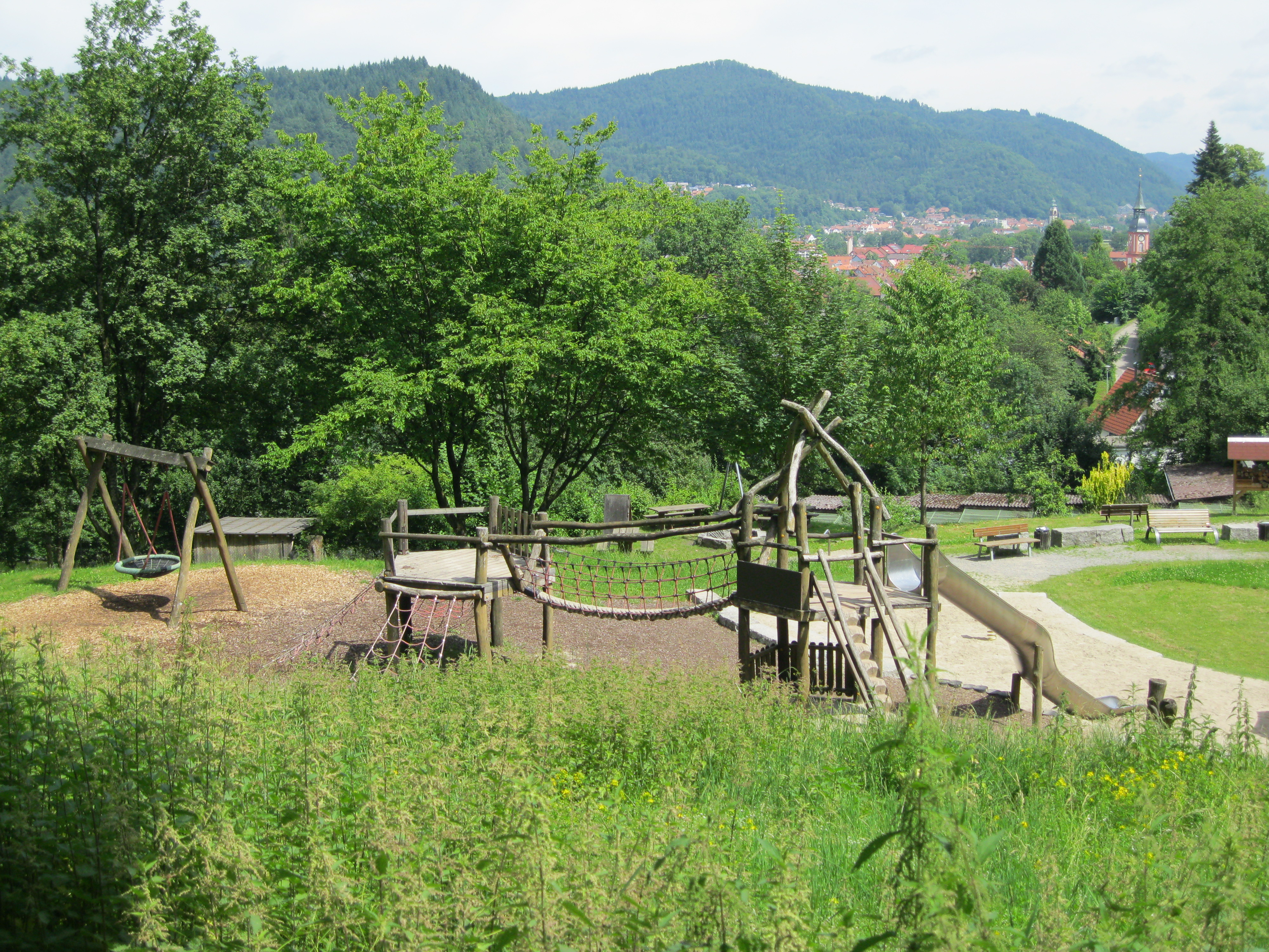 Die Spielarena im Zoo